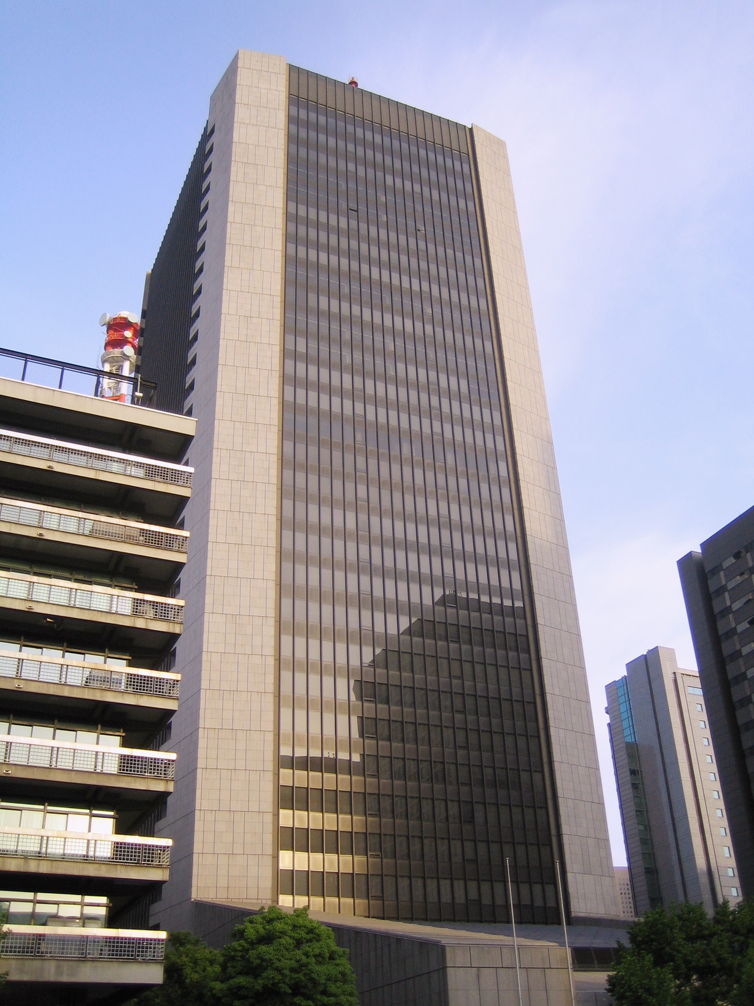 Mizuho Bank, Ltd. (みずほ銀行 Mizuho Ginkō), in Chiyoda, Tokyo, Japan